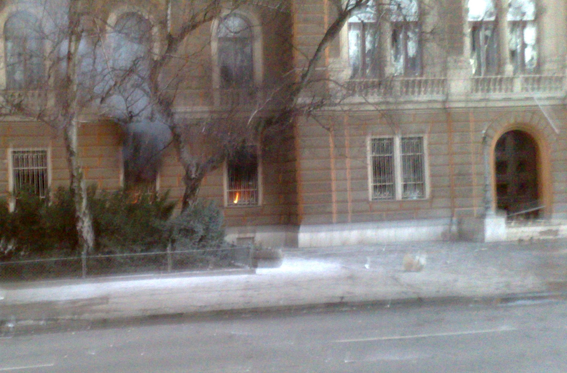 Slika sa protesta u Bosni i Hercegovini 2014. godina i požar u zgradi Predsjedništva Bosne i Hercegovine.